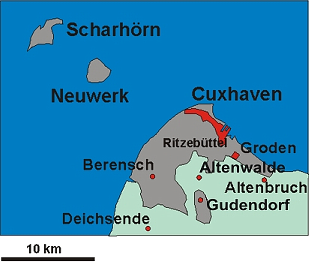 Karte von Cuxhaven